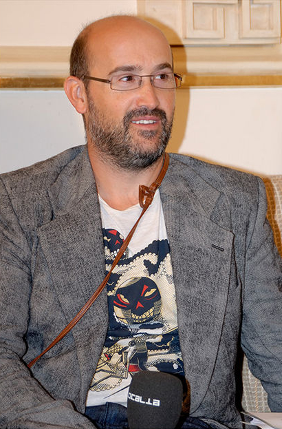 Javier Cámara, actor español.